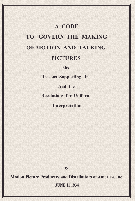 Capa do Código Hays de 1934, restaurada digitalmente.